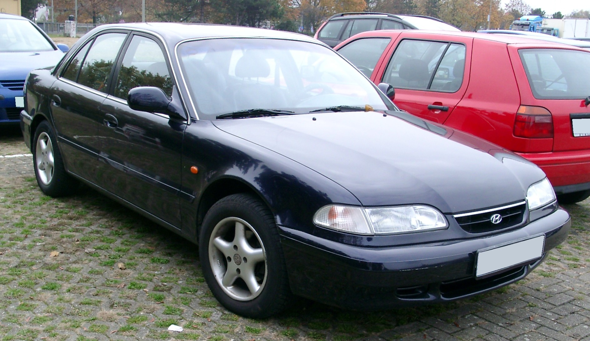 Hyundai Sonata, 2. Generation